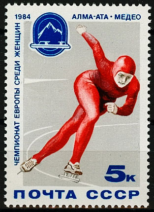 Почтовая марка